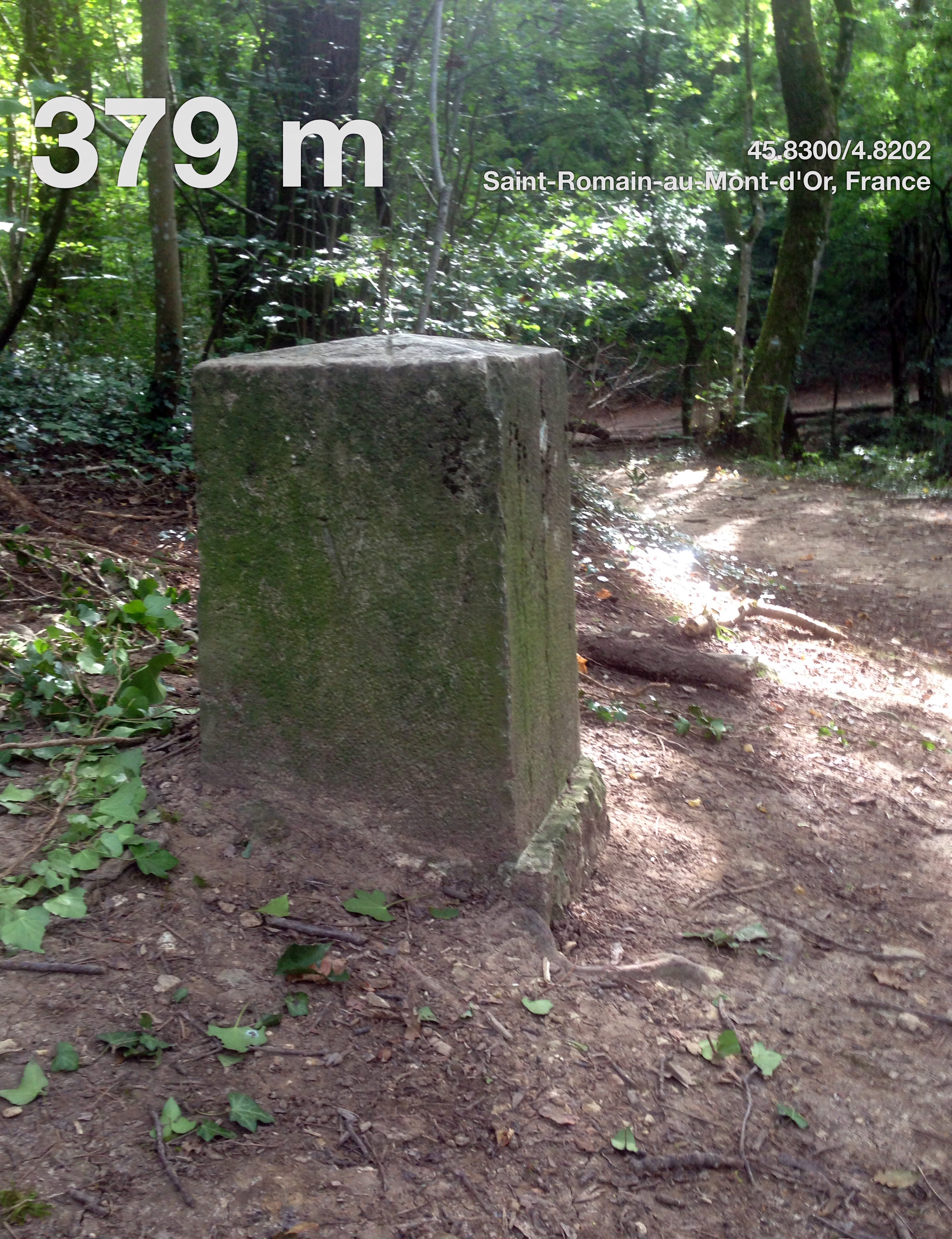 Borne de servitude militaire n°V de la Batterie de La Frêta située sur les communes de Saint-Cyr-au-Mont-d'Or et de Saint-Romain-au-Mont-d'Or.